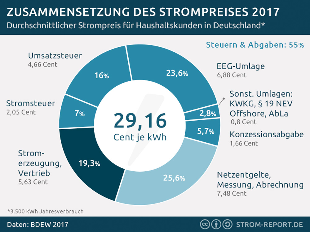 Zusammensetzung des Strompreises für private Haushalte 2019 in Deutschland (für einen Jahresverbrauch von 3.500 Kilowattstunden). Die Zahlen wurden vom BDEW - Bundesverband der Energie- und Wasserwirtschaft e.V. - in einer Strompreisanalyse im Juli 2019 ermittelt. (